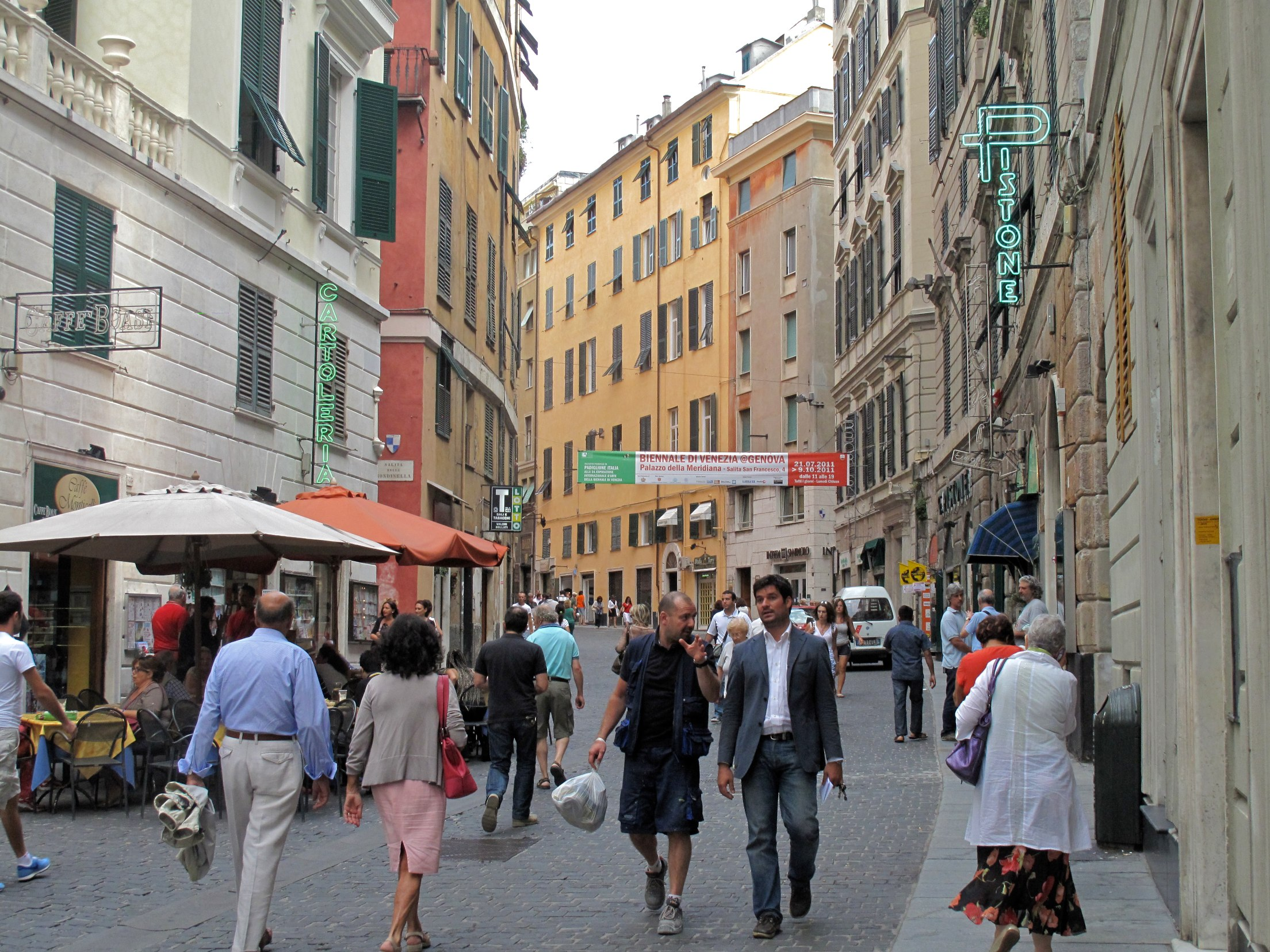 Vacances juillet 2011 en Ligurie